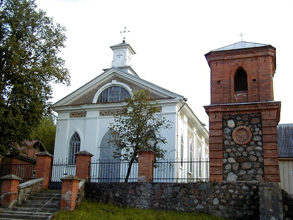 Borovkas baznīca 2000-07-21